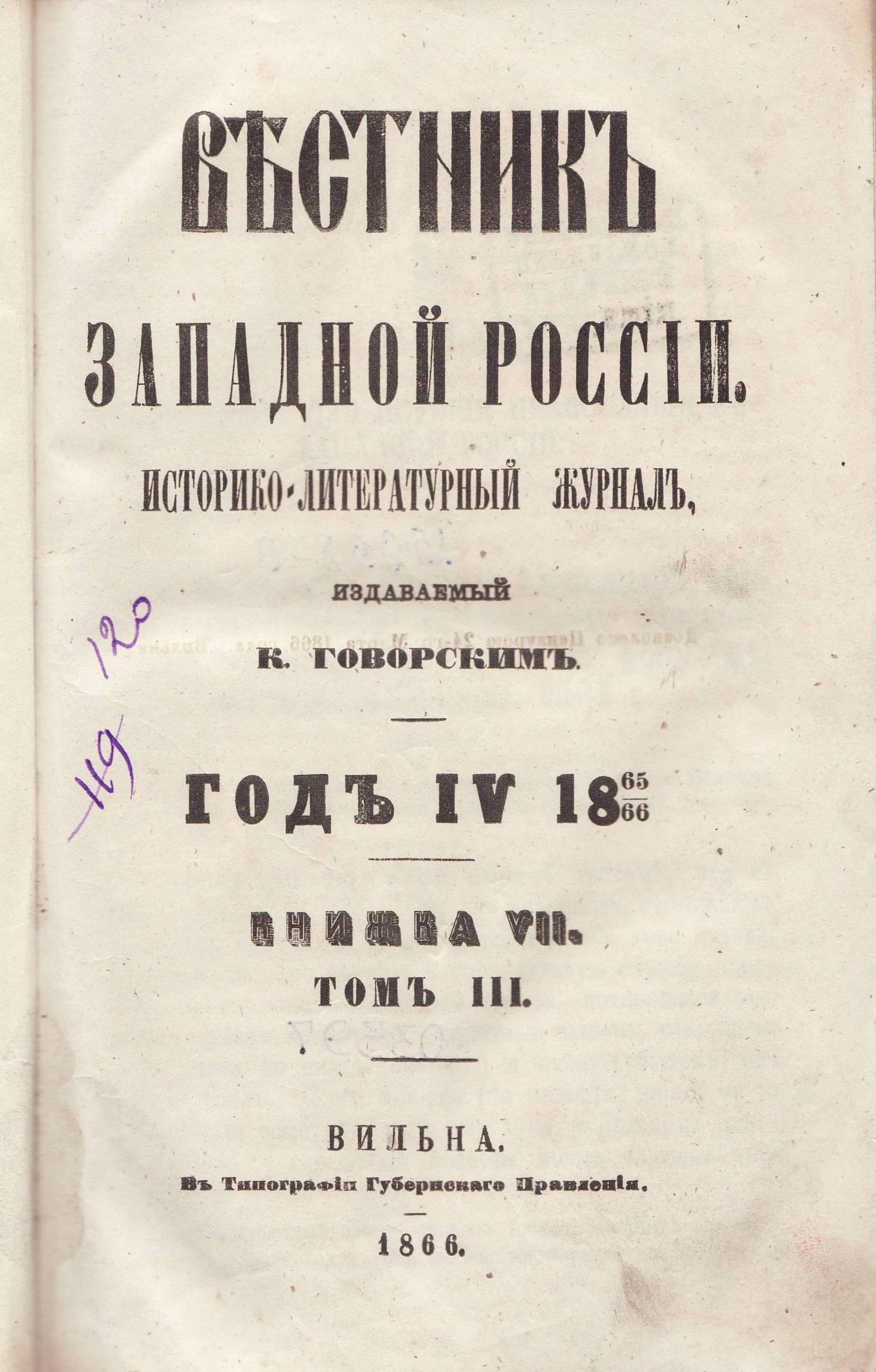 Вестник Западной России. Титульная страница журнала. 1866. Книжка VII